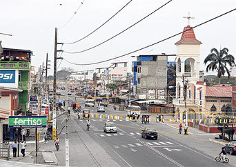 Avenida Principal Rio Amazonas